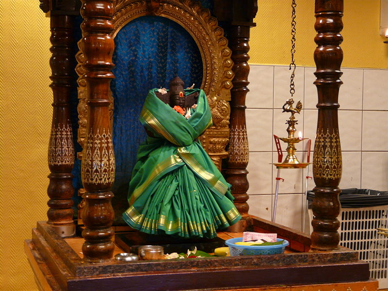 Gudebilde, Norsk Hindu Kultursenter, Rødtvet i Oslo